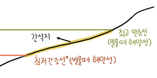 저조선